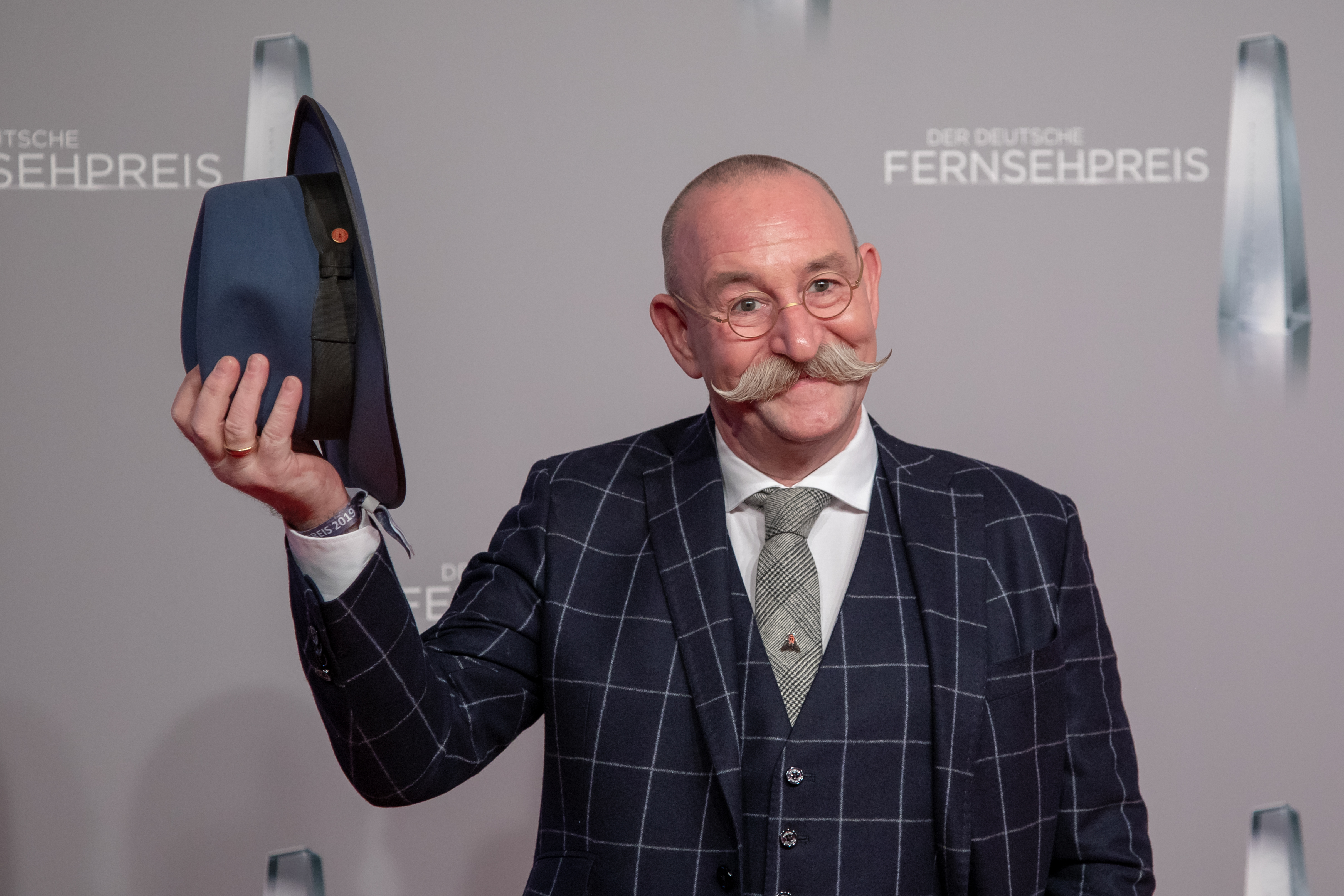 Horst Lichter beim Deutschen Fernsehpreis 2019 in der Düsseldorfer Rheinterrasse